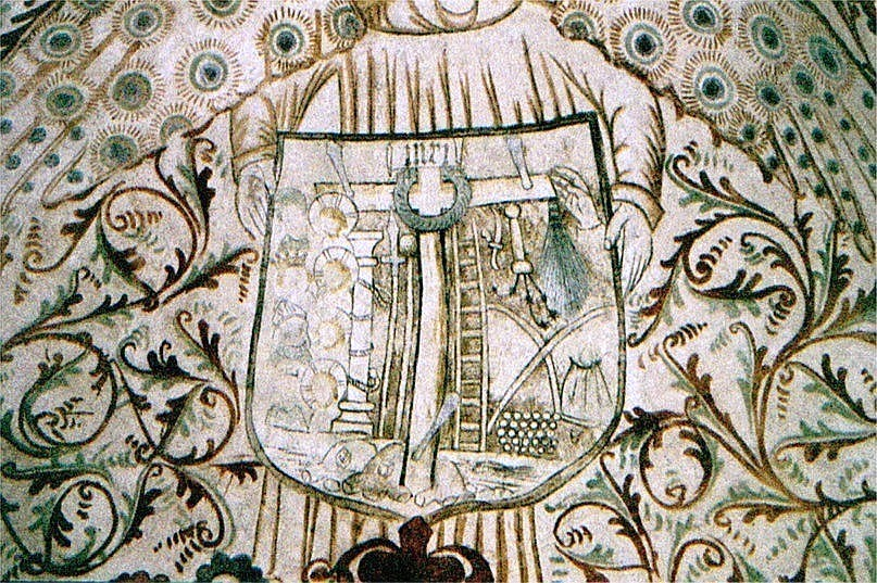 Egtved Kirke i Danmark. Korhvælv sydkappe, Kristus våben